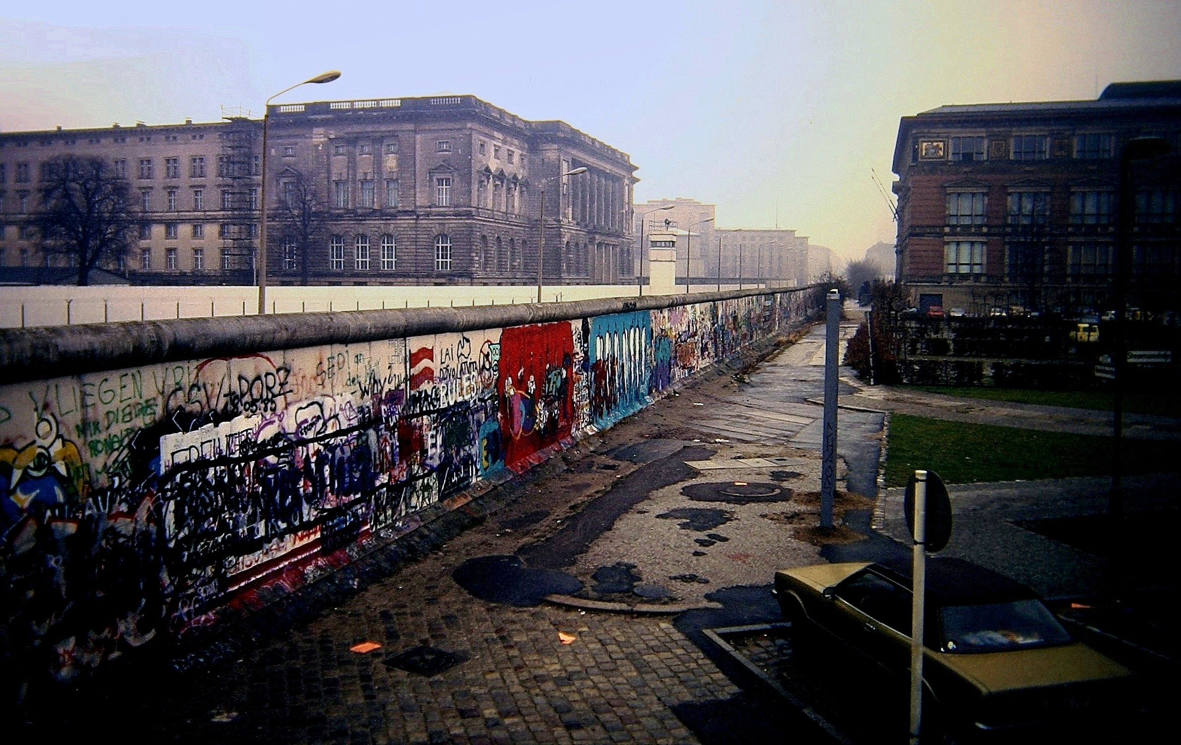 Berlin Wall, Niederkirchnerstraße, Berlin 1988